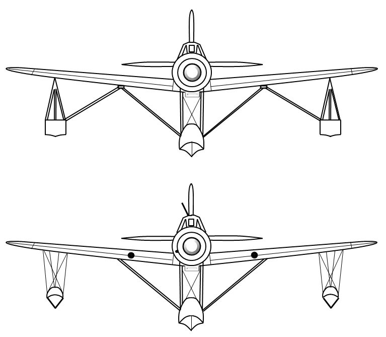 Frontalansicht Arado Ar 196. Oben V-3, Unten V-4 (nach Jörg Armin Kranzhoff: Die Arado-Flugzeuge – Vom Doppeldecker zum Strahlflugzeug (Die deutsche Luftfahrt Band 31). Bernard & Graefe Verlag, Koblenz 2000, ISBN 3-7637-6122-5, S. 135 und Hans-Jürgen Becker, Elmar Wilczek: Wasserflugzeuge – Flugboote, Amphibien, Schwimmerflugzeuge (Die deutsche Luftfahrt Band 21). Bernard & Graefe Verlag, Koblenz 1994, ISBN 3-7637-6106-3, S. 196.)